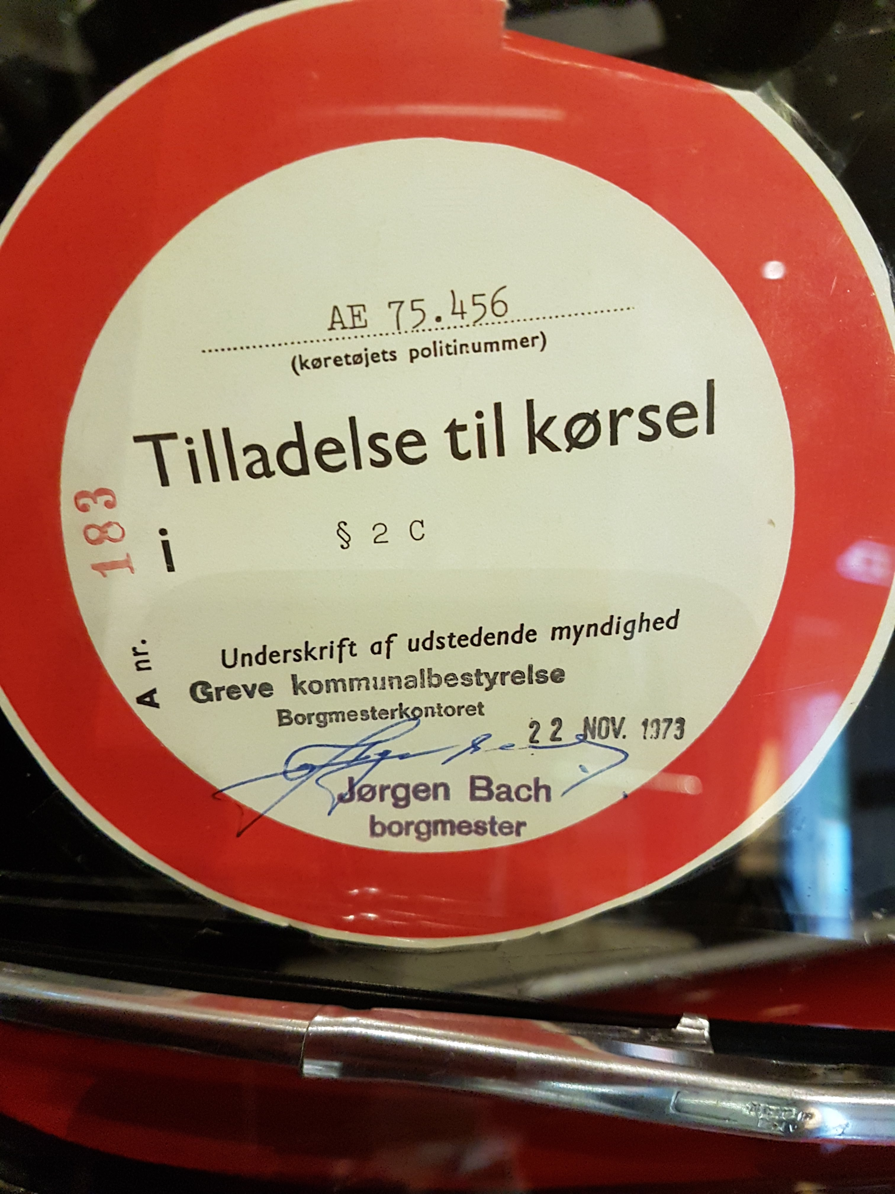 Tilladelse til søndagskørsel